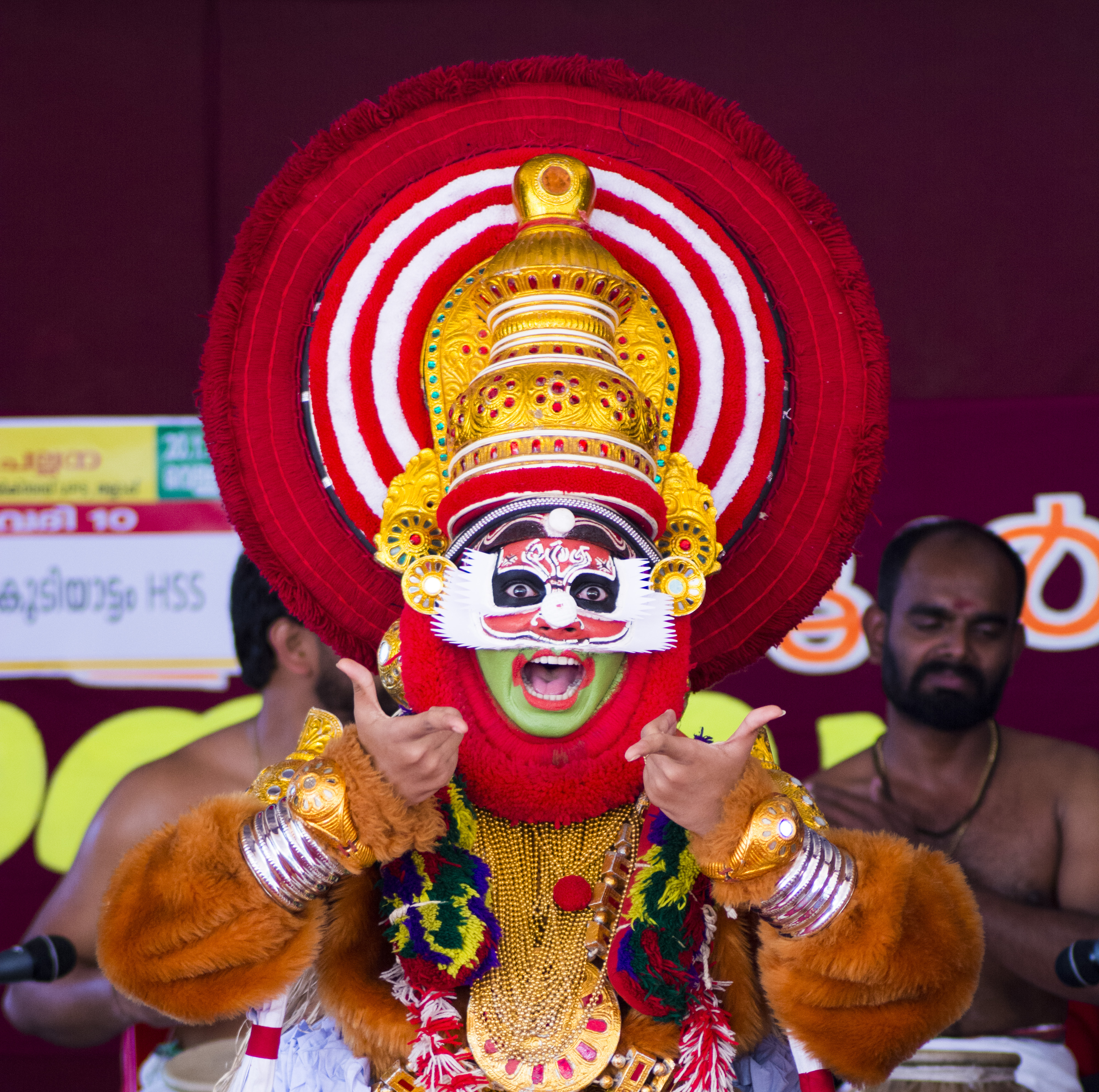 kerala school kalolsavam